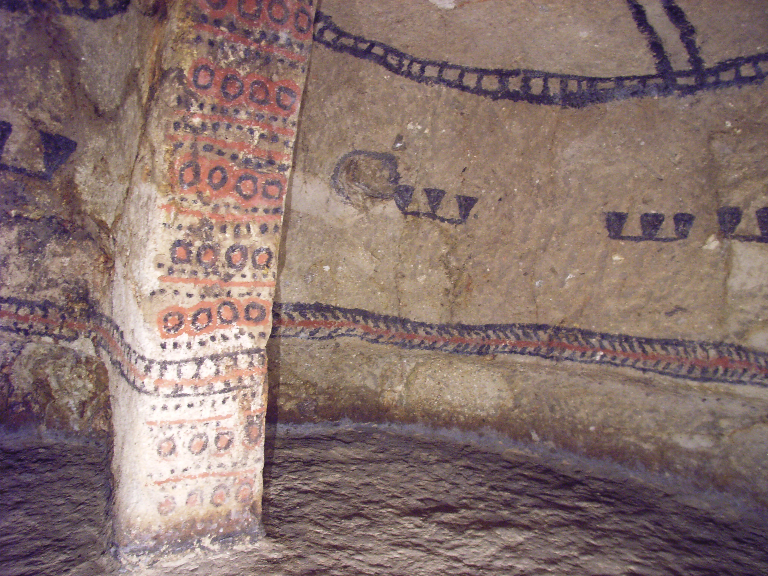 Tumba Tierradentro. Colombia